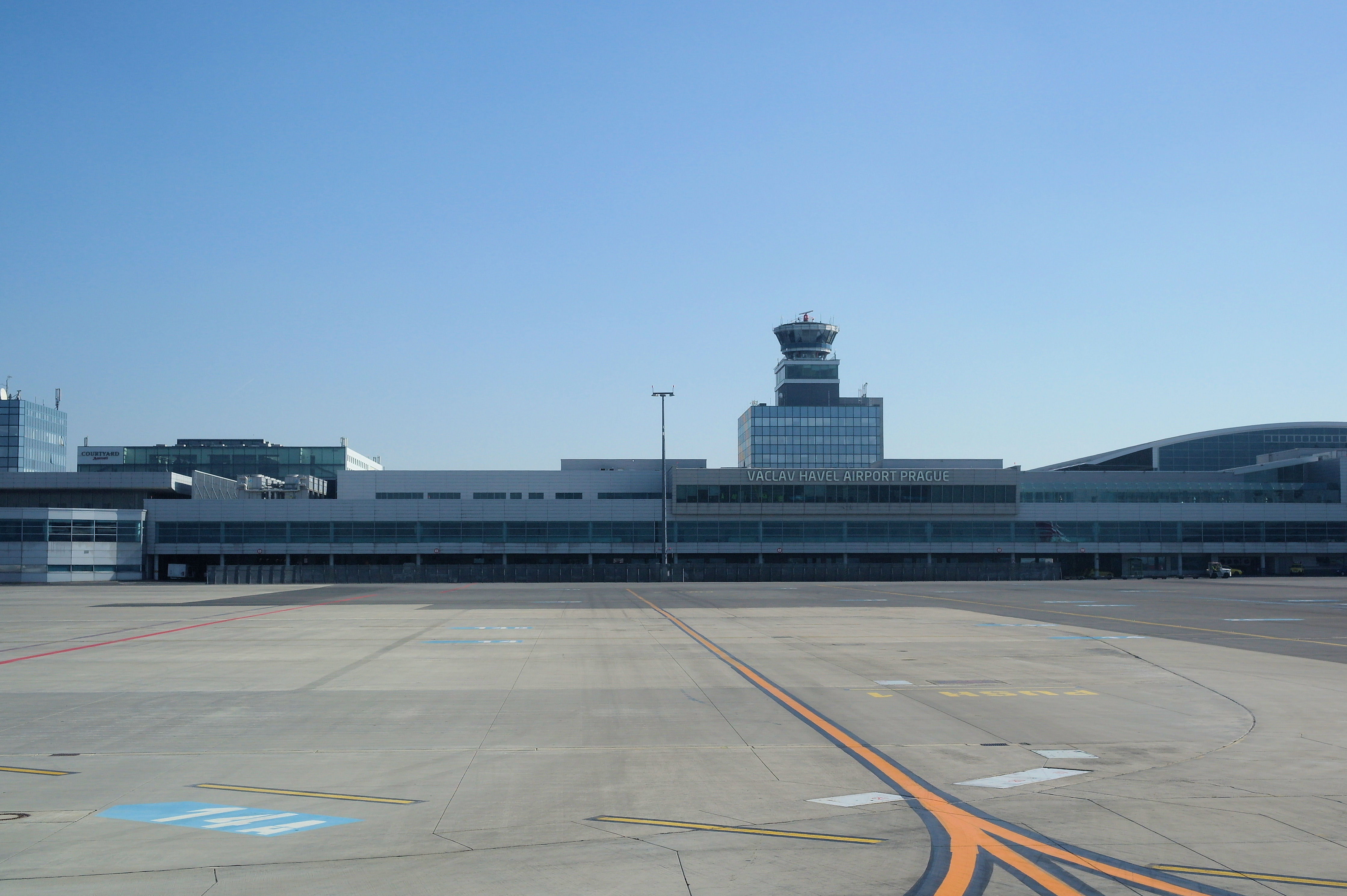 Letiště Václava Havla Praha z pojezdové dráhy